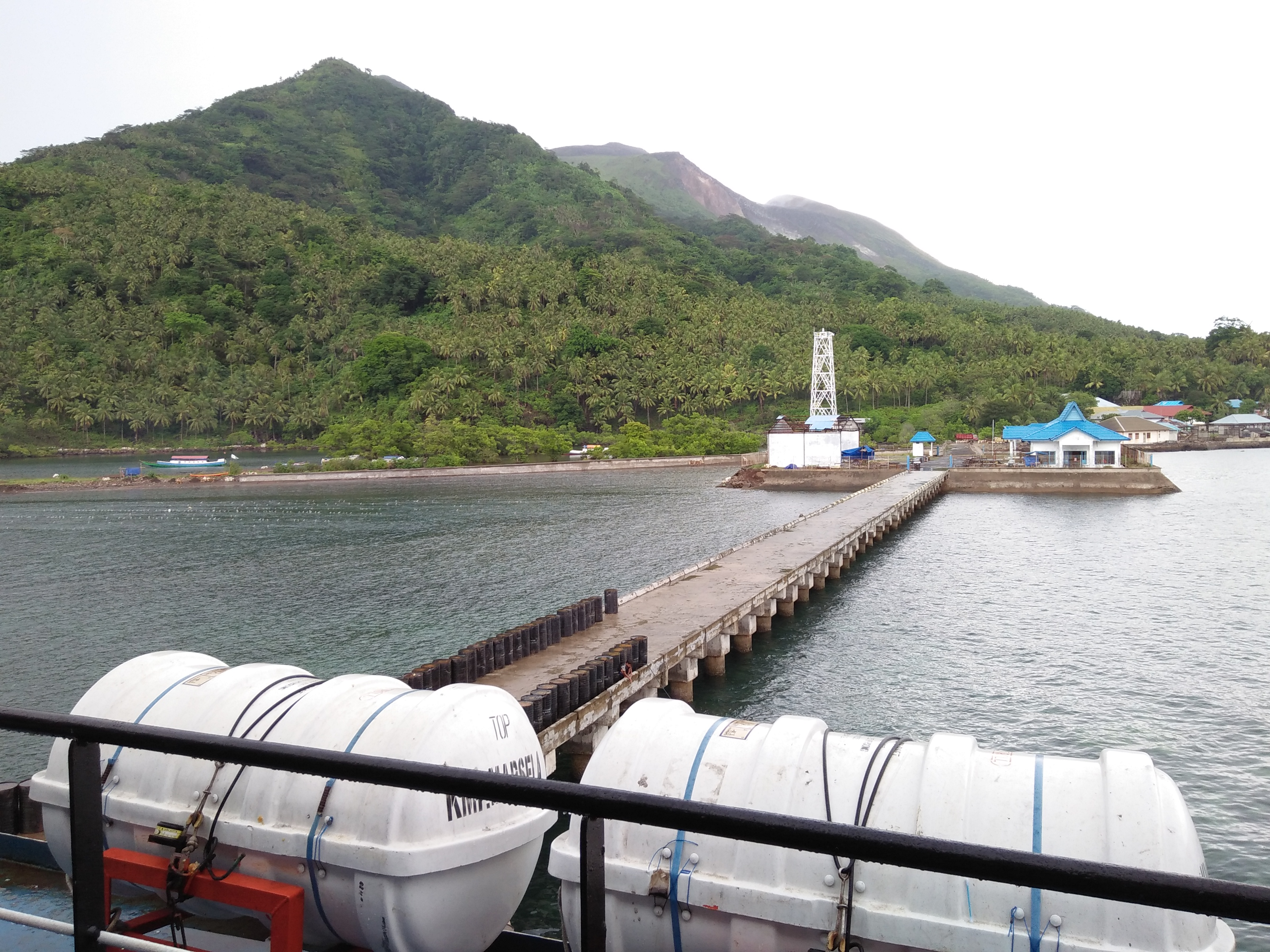 Damer adalah sebuah kecamatan di Kabupaten Maluku Barat Daya, Maluku, Indonesia.